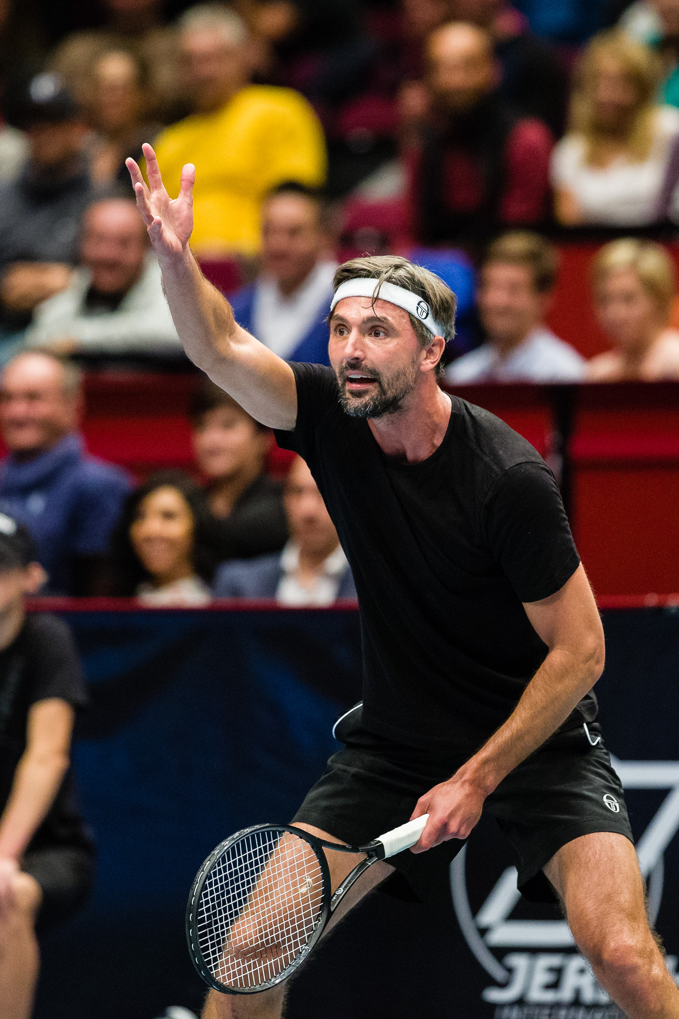 Tie Break Tens in Wien am 23.10.2016 (side event der Erste Bank Open ATP World Tour 500 2016)